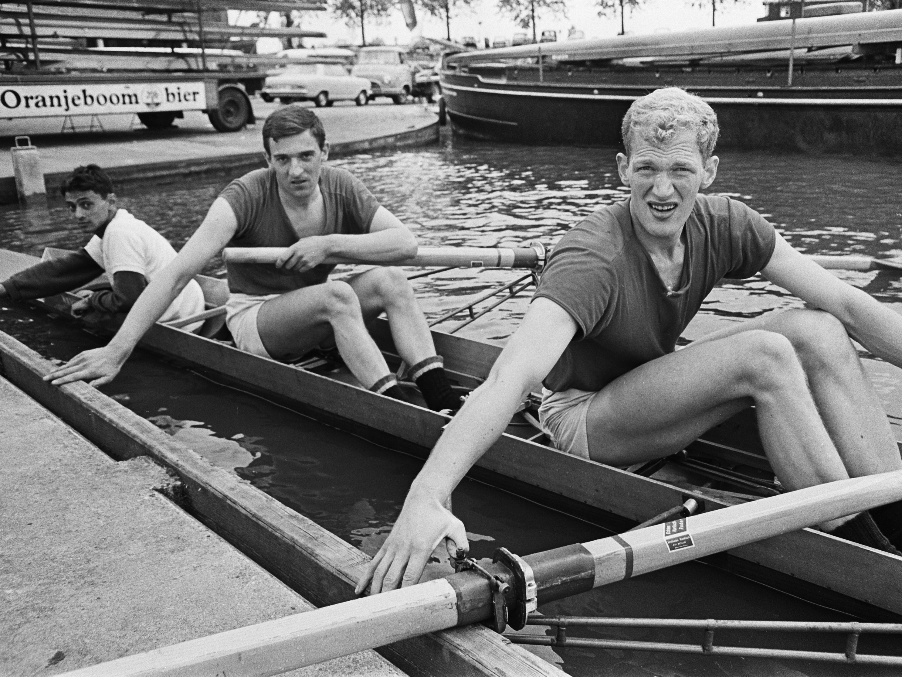 Twee met stuurman van roeivereniging D.S.R.V. Laga. Rody Rijnders (stuurman), Herman Suselbeek en Hadriaan van Nes 18 juni 1967